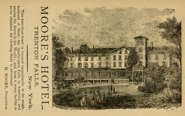 Advertisement